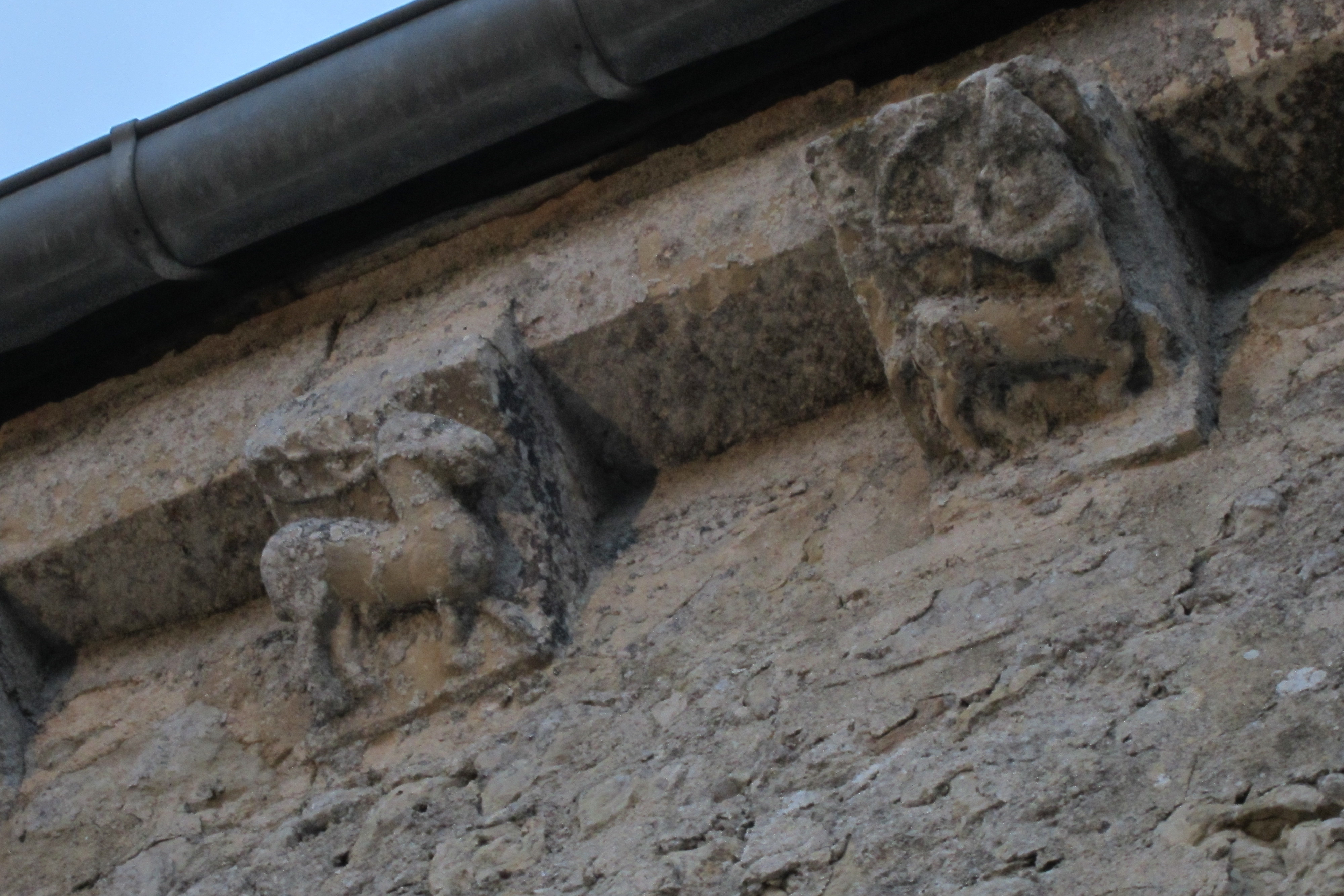 Foucarville, Manche